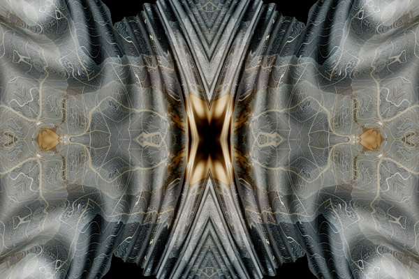 Antoni Kowalski, Drzewo żywota-zazdrość, druk cyfrowy, 110x150 cm, 2015. Antoni Kowalski, Tree of life-jealousy, digital print, 110x150 cm, 2015 Antoni Kowalski, Le bois de la vie- jalousie, numerique graphique, 110x150 cm, 2015